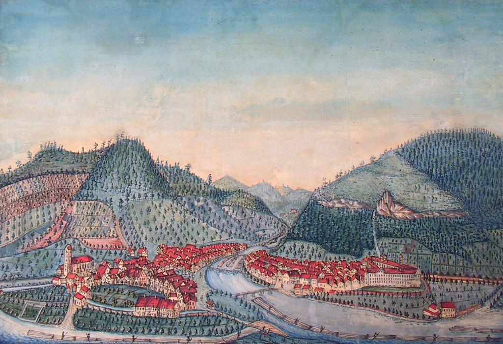 Wolfach im Schwarzwald 1836. Temperabild "nach der Natur gezeichnet und gemalt" durch Johann Schmidt, Färbermeister aus Hohentengen. Das Original befindet sich im städtischen Museum in Wolfach.